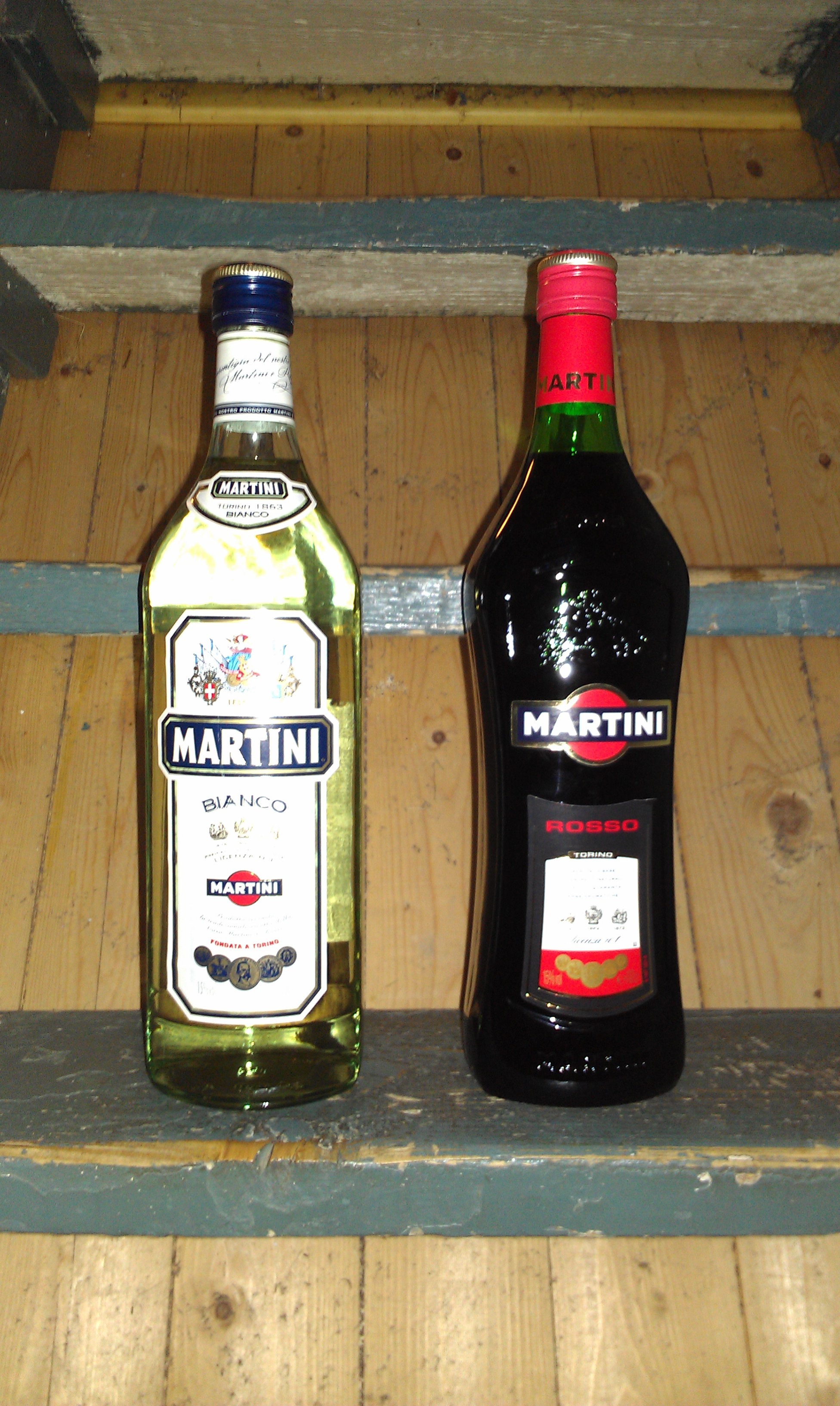 Bilde av Martini Blanco og Martini Rosso.